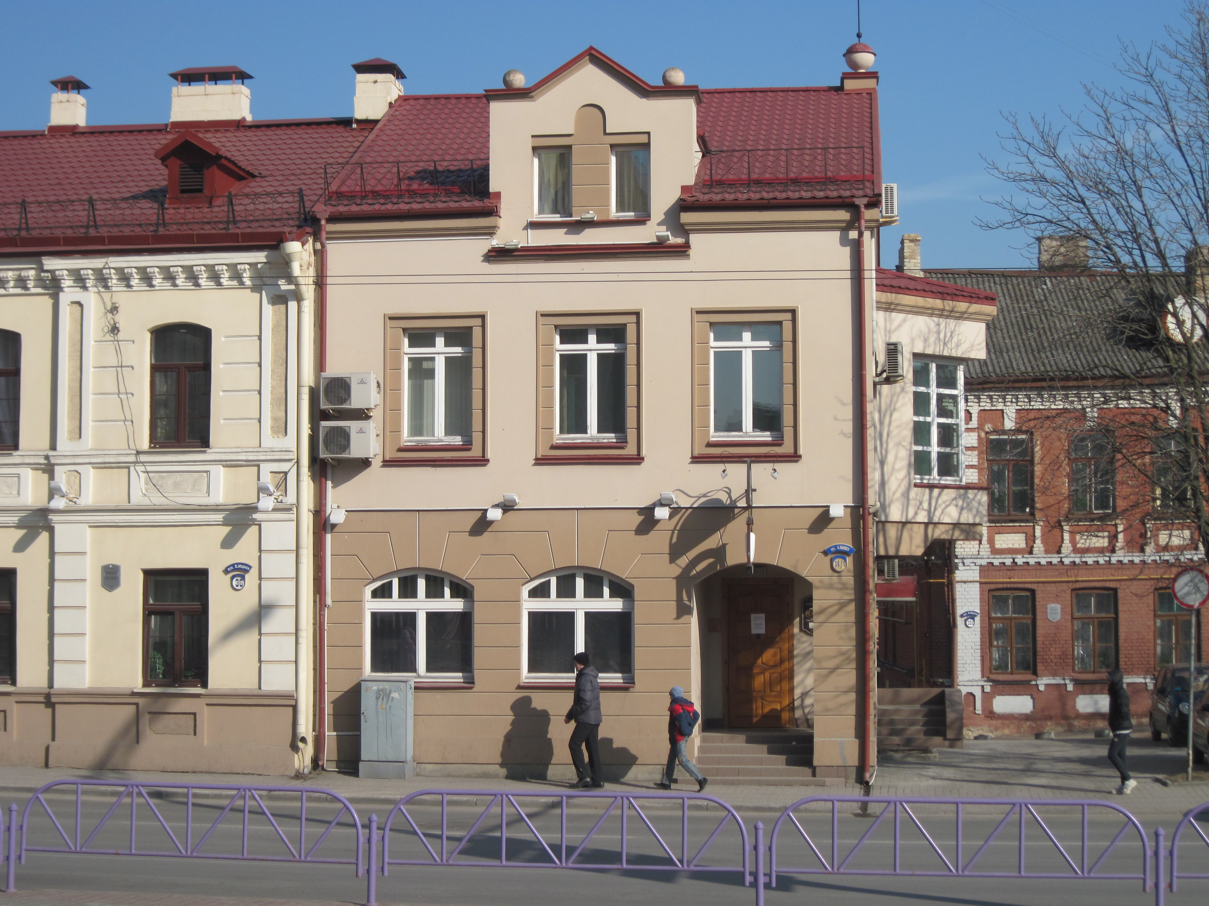 Беларуская (тарашкевіца): Забудова гістарычнага цэнтра Гродна. Вуліца К. Маркса, 36/1